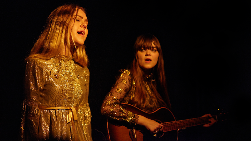 First Aid Kit im "Zoom", Frankfurt am Main